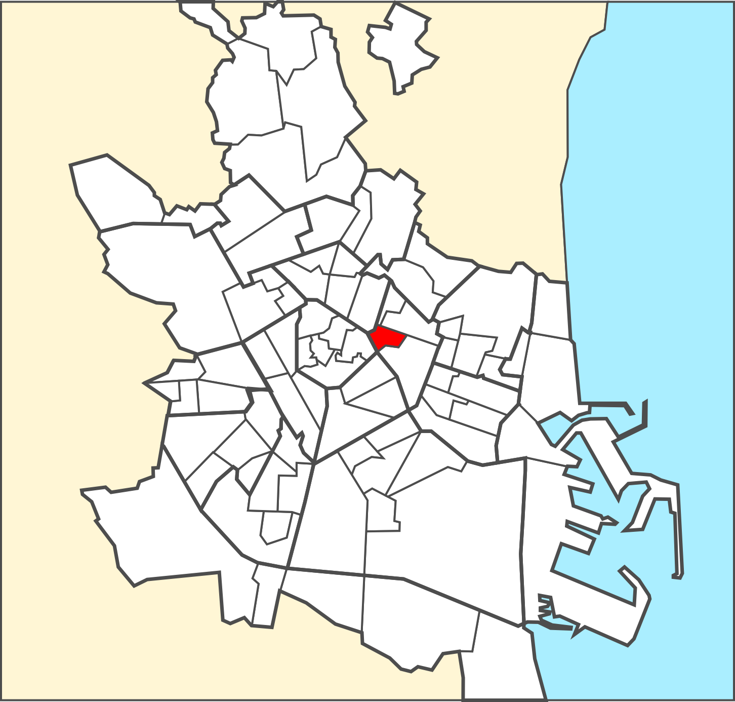 Localització del barri dins de la ciutat de València.